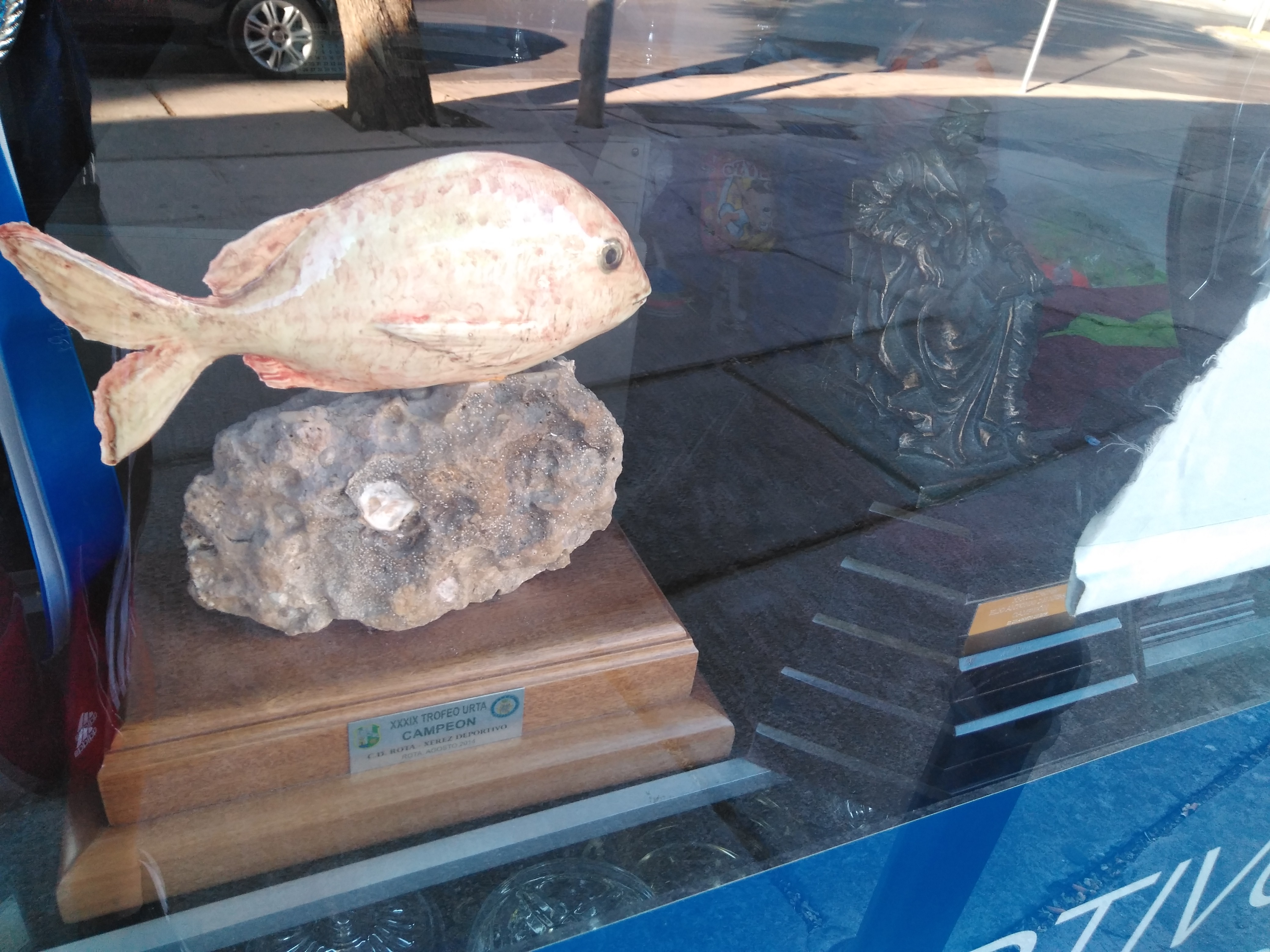 Trofeo de la Urta (CD Rota) ganado por el Xerez DFC (Jerez de la Frontera, España)